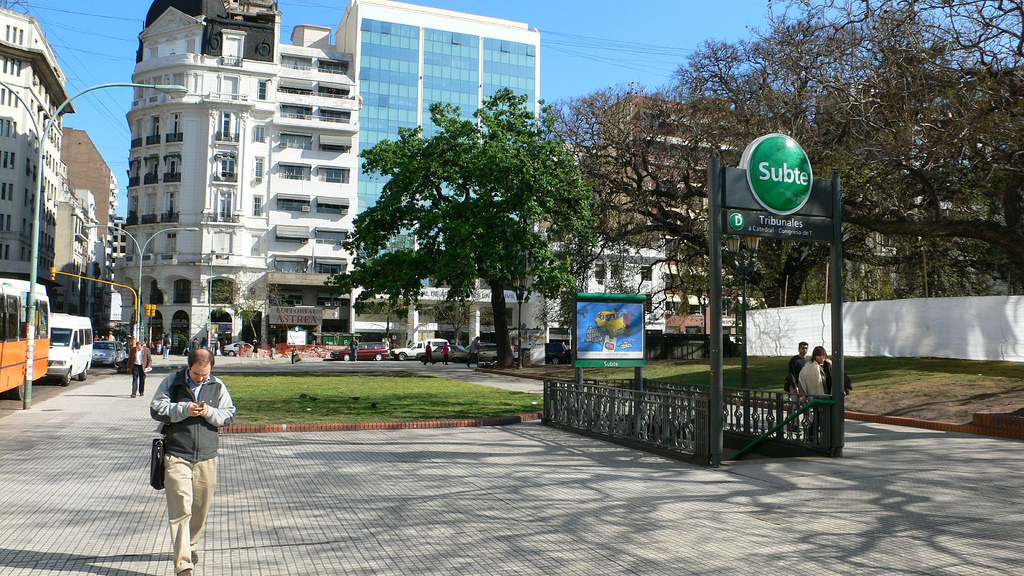 Salida de la estación Tribunales del Subte de Buenos Aires, Argentina